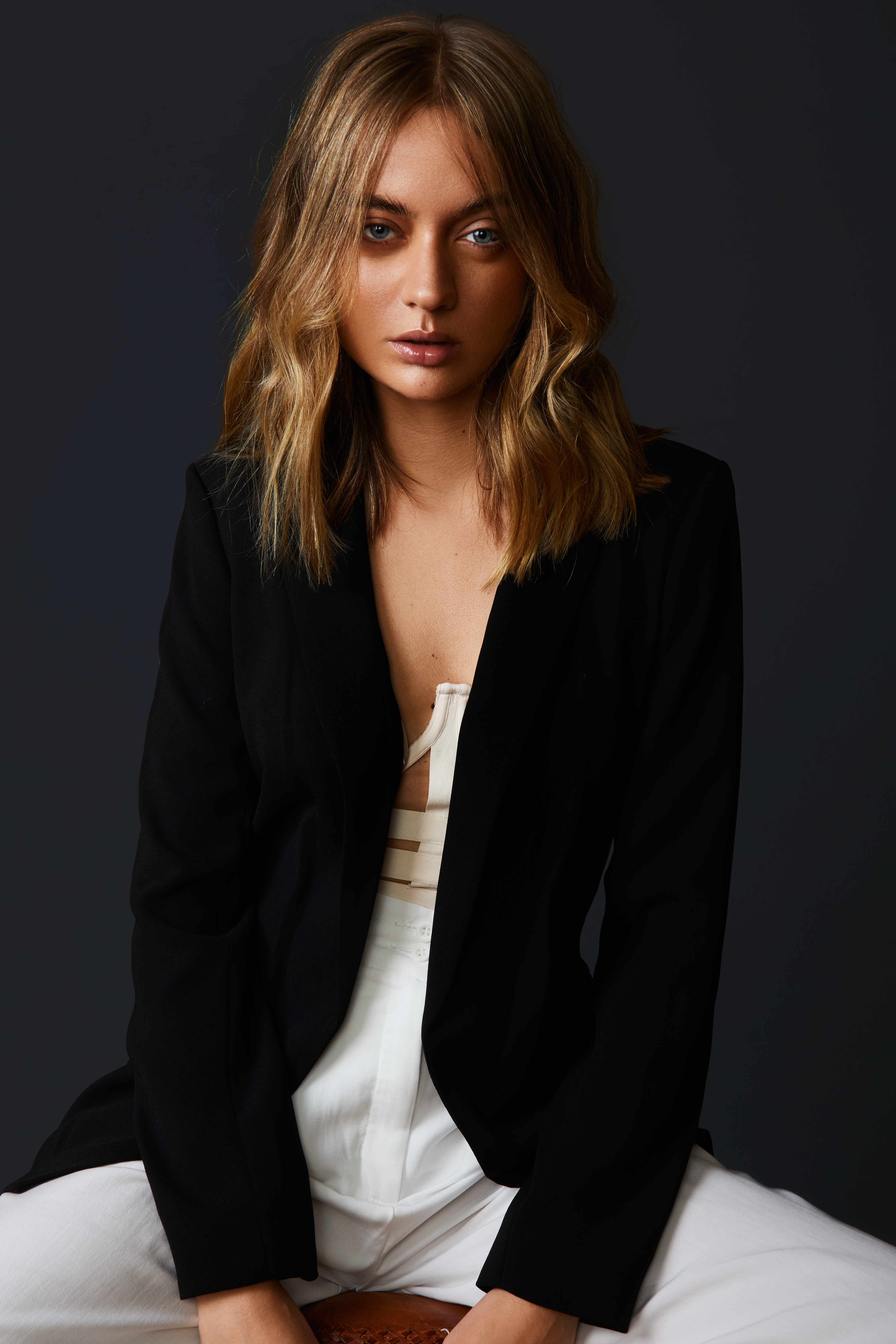 Elisabeth Aronis